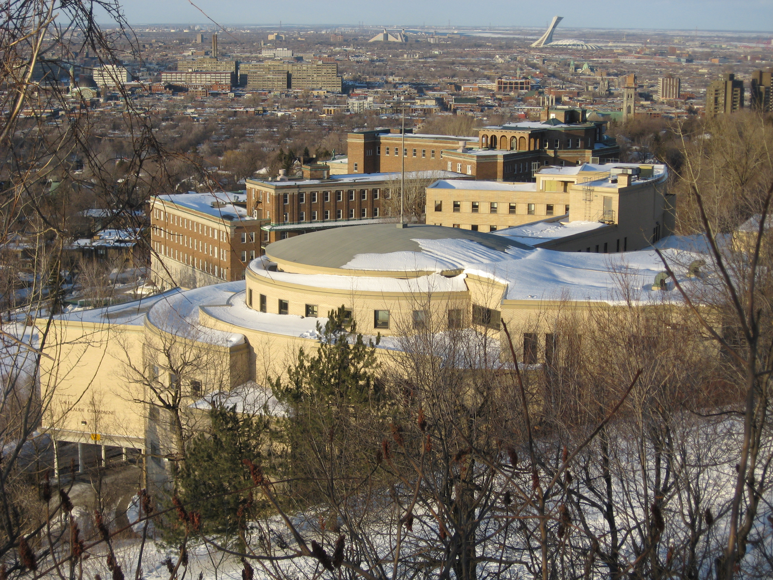 Pavillon de la Faculté de Musique, Université de Montréal